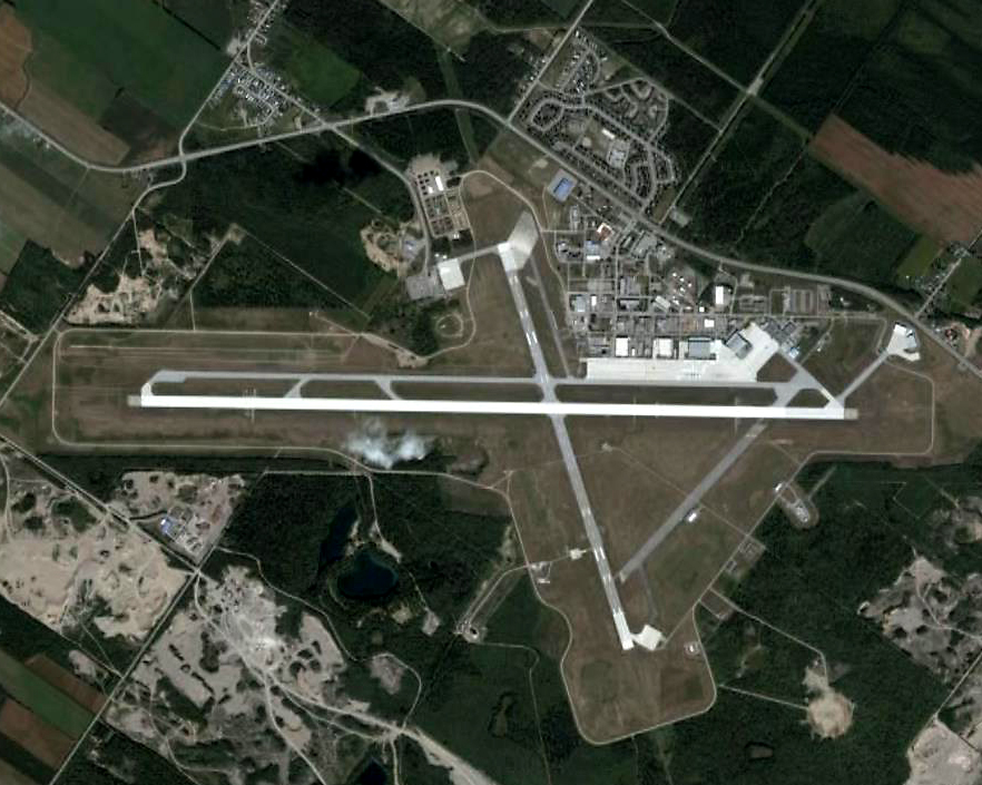 CFB Bagotville (CYBG)